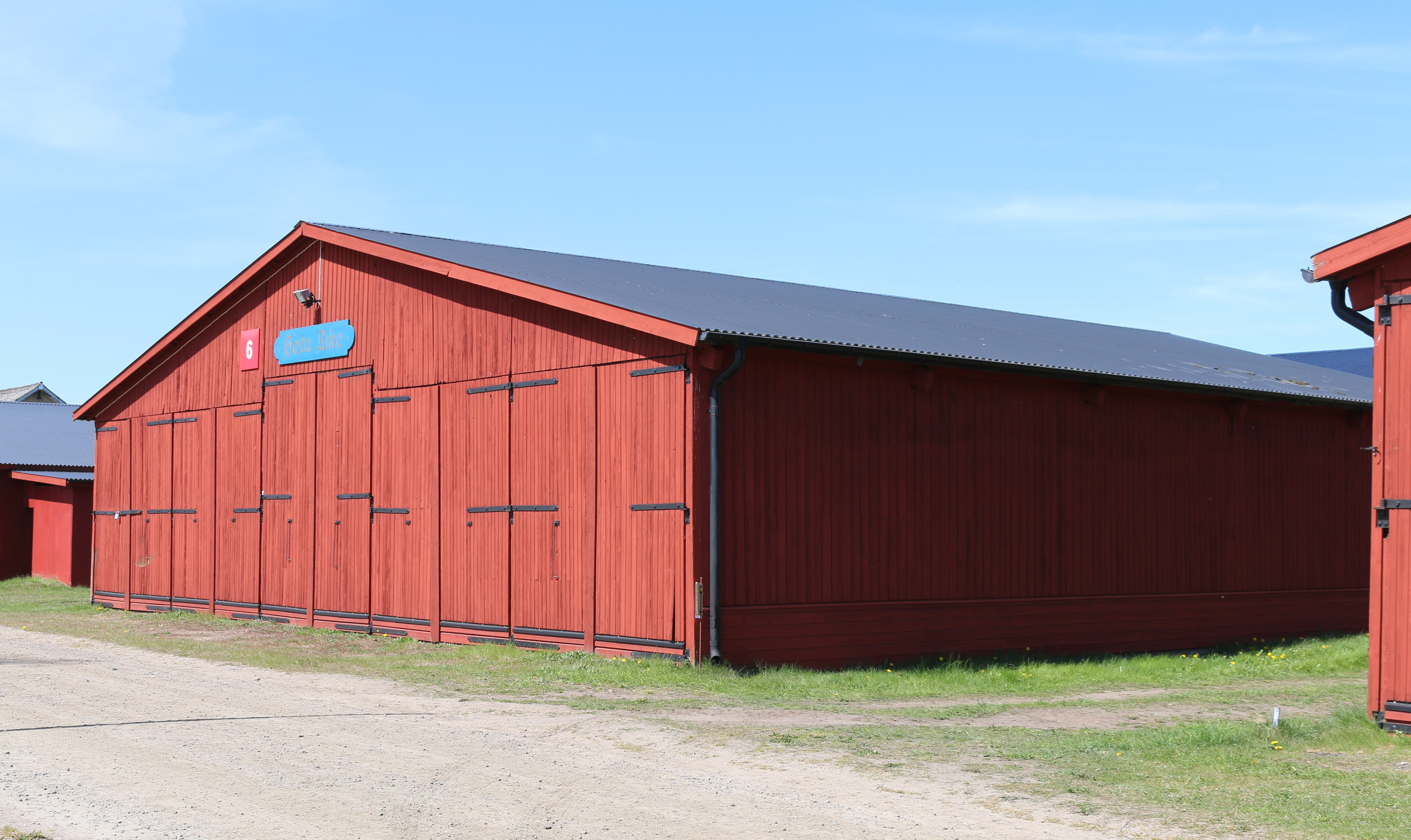 Mobiliseringsförråd Artillerimuseet 2017